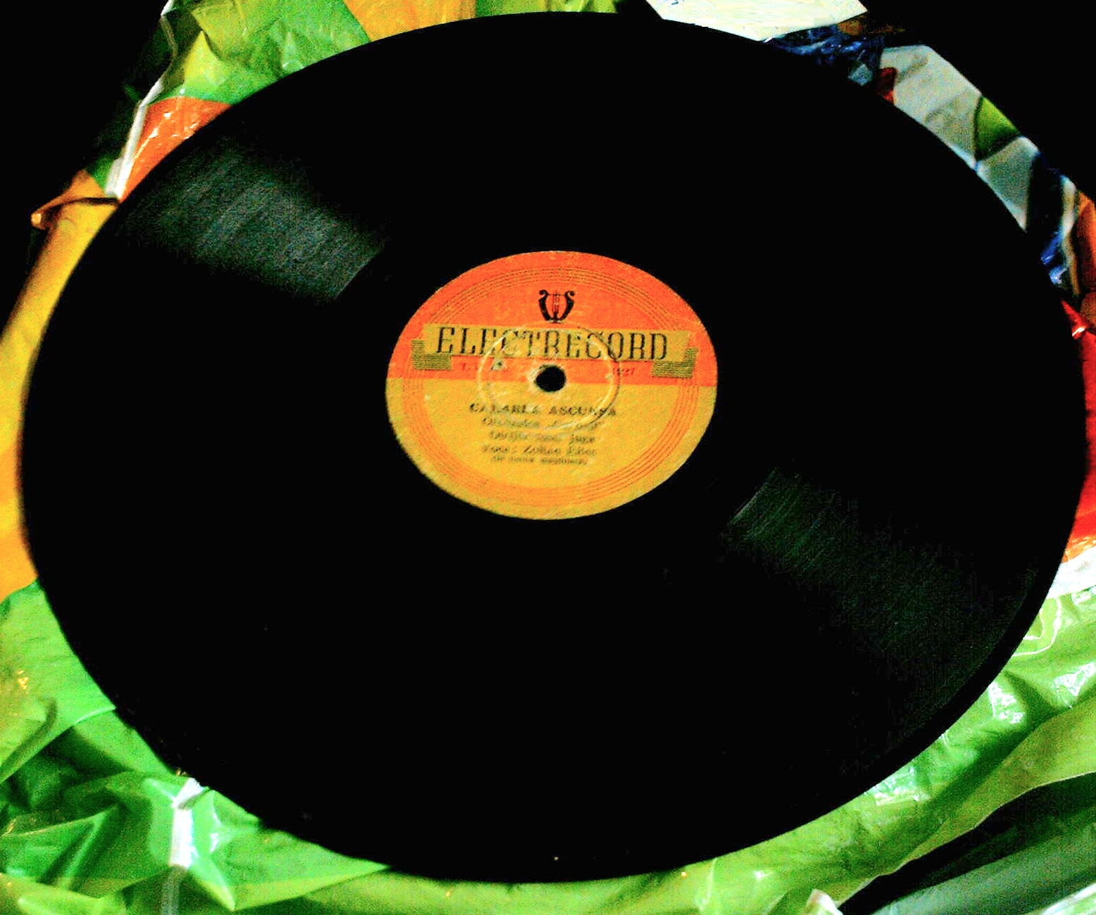 Early Electrecord gramophone record Side 1: Electrecord T.T. ???9 1927 Cărarea ascunsă Orchestra «Carpaţi» Dirijor: Iosif Juga Voce: Zoltan Éltes (în limba maghiară) Side 2: Electrecord T.T. ?662 1927 Tare-i supărată mama Orchestra Iosiv Juga Voce: Iosif Schatt (în limba maghiară)